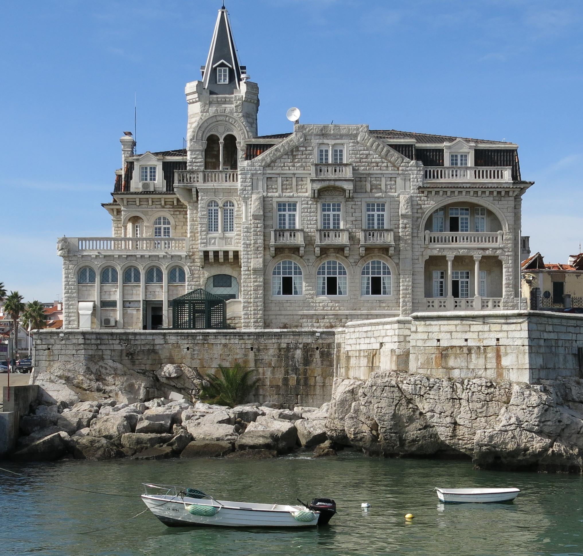 2016-10-18_Cascais_6043